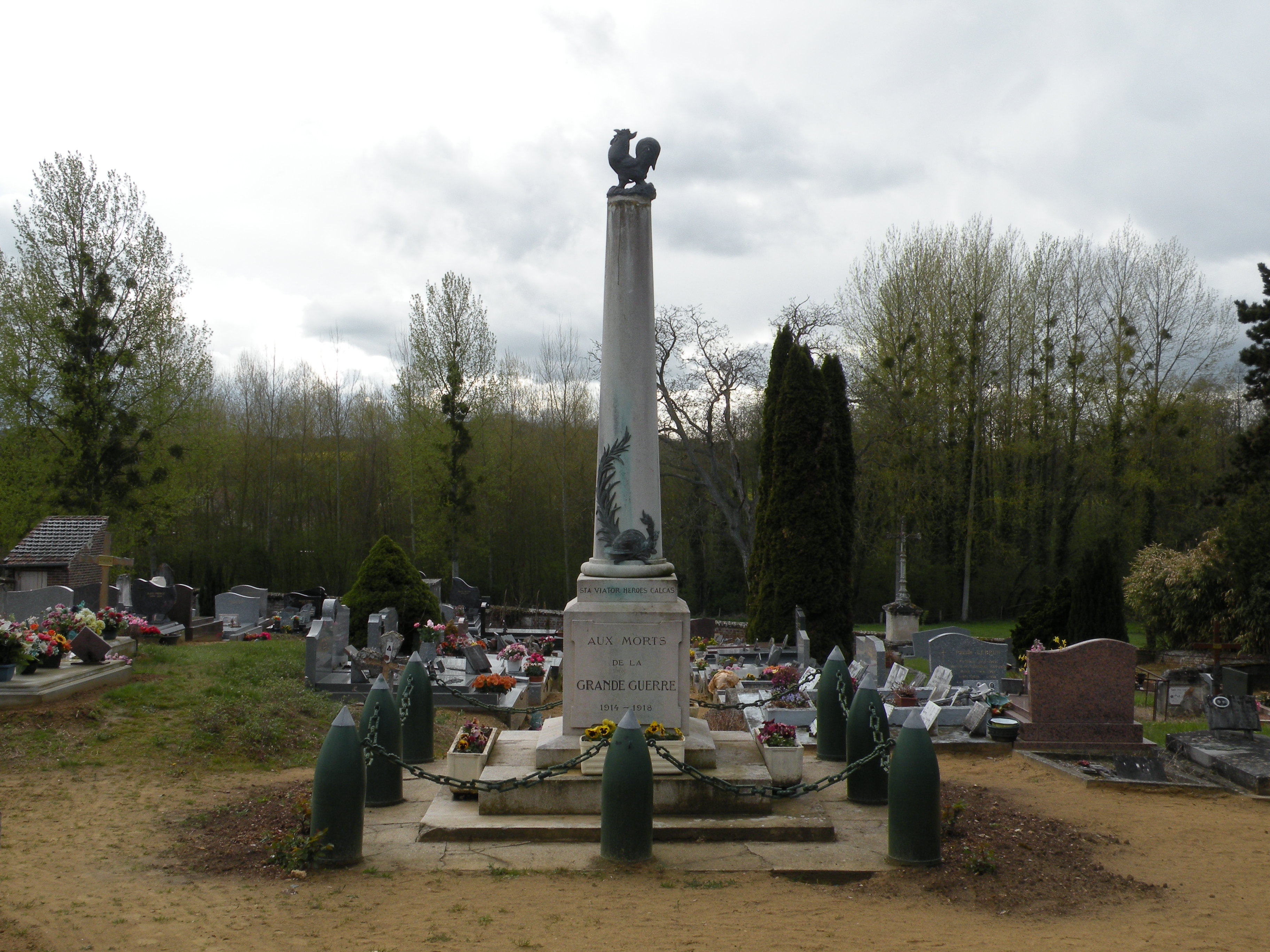 monument aux morts de Ponchon